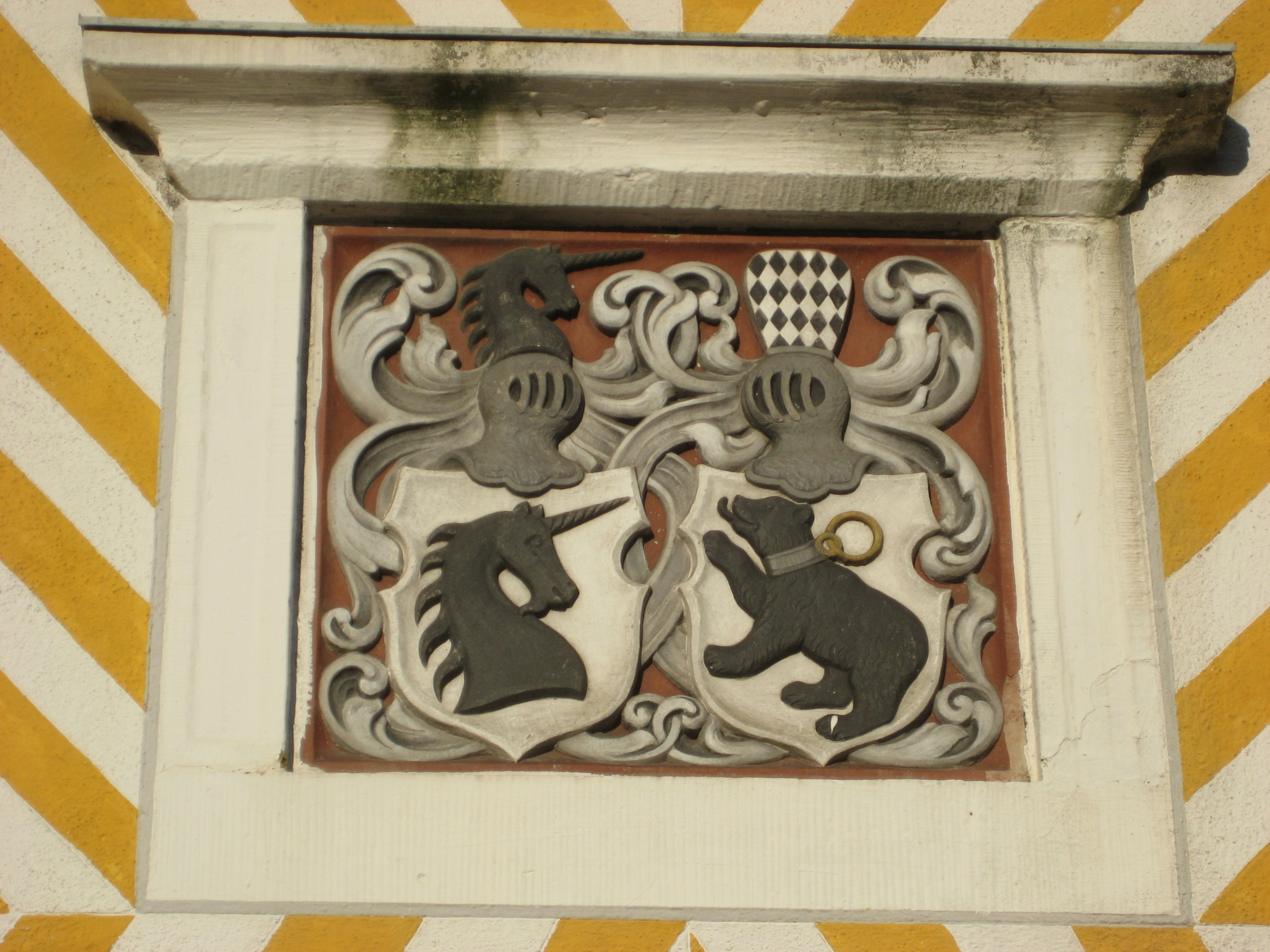 Wappen der Familien von Leden (links) und von Bar (rechts) am Palas des Ledenhofes in Osnabrück